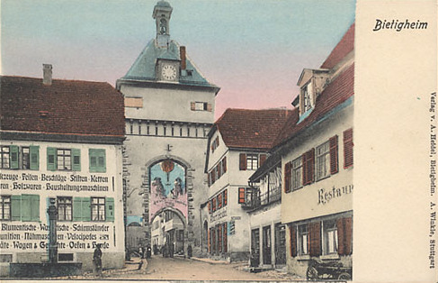 Ansichtskarte von Bietigheim: Stadttor